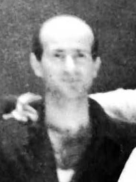 Pietro Consagra, Roma, 1947 Autore sconosciuto Fonte: Licensing Categoria:Immagini di artisti italiani